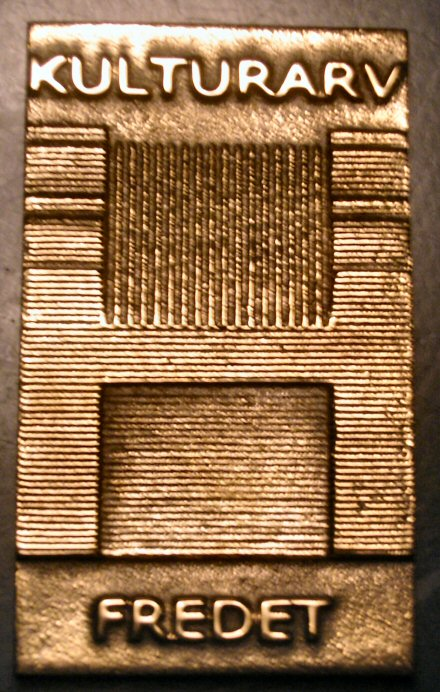 Skilt til fredede bygninger